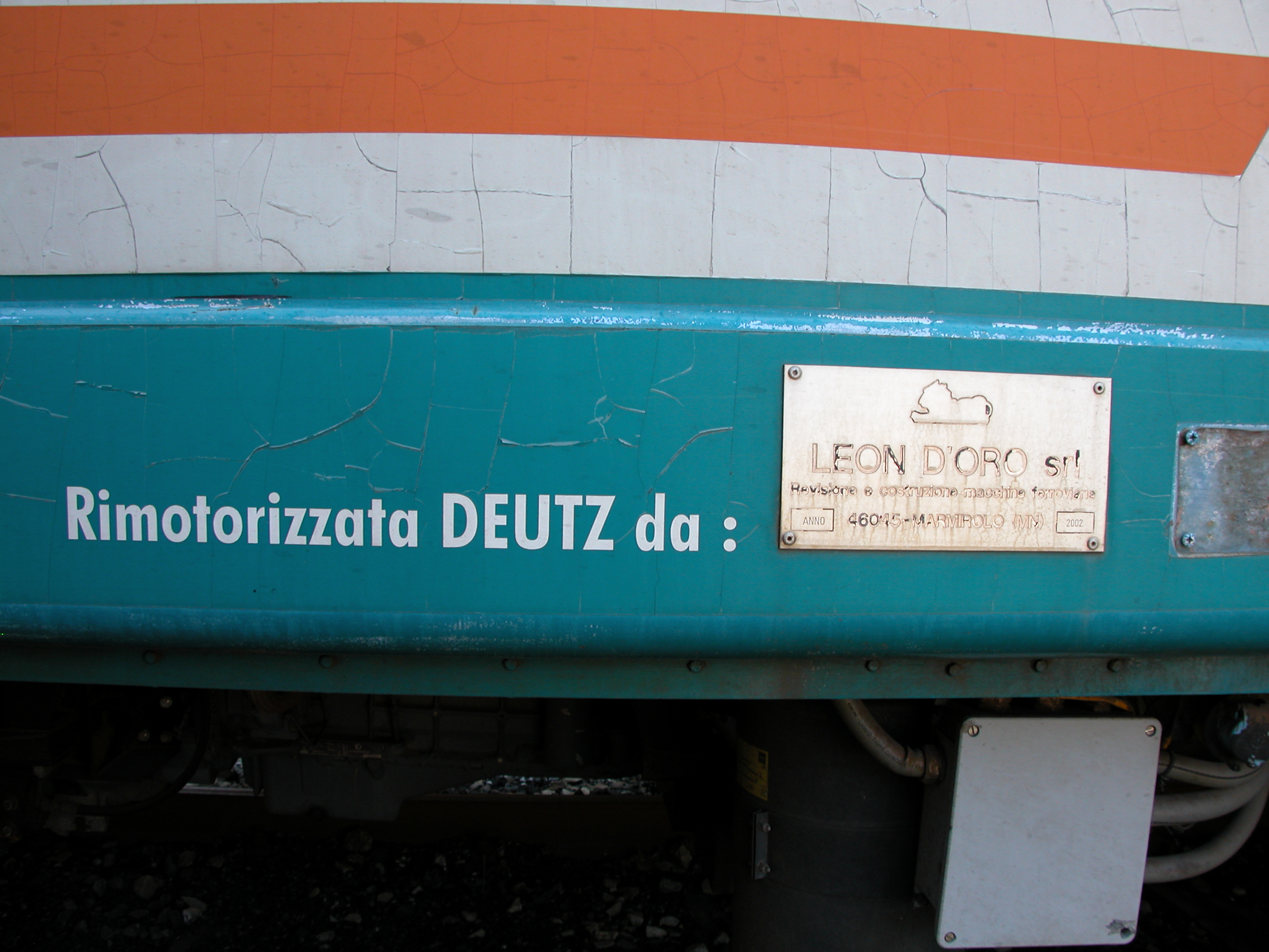 La targa posta sulla fiancata dell'automotrice FS ALn 668.1462 dalle Officine Leon d'Oro in occasione dell'installazione dei nuovi motori Deutz 013 BF6M nel 2002.